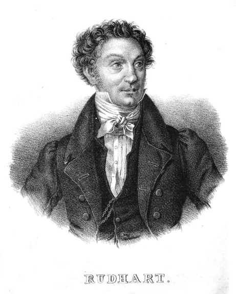 Ignaz von Rudhart (1790-1838) bayerischer Staatsmann und griechischer Ministerpräsident